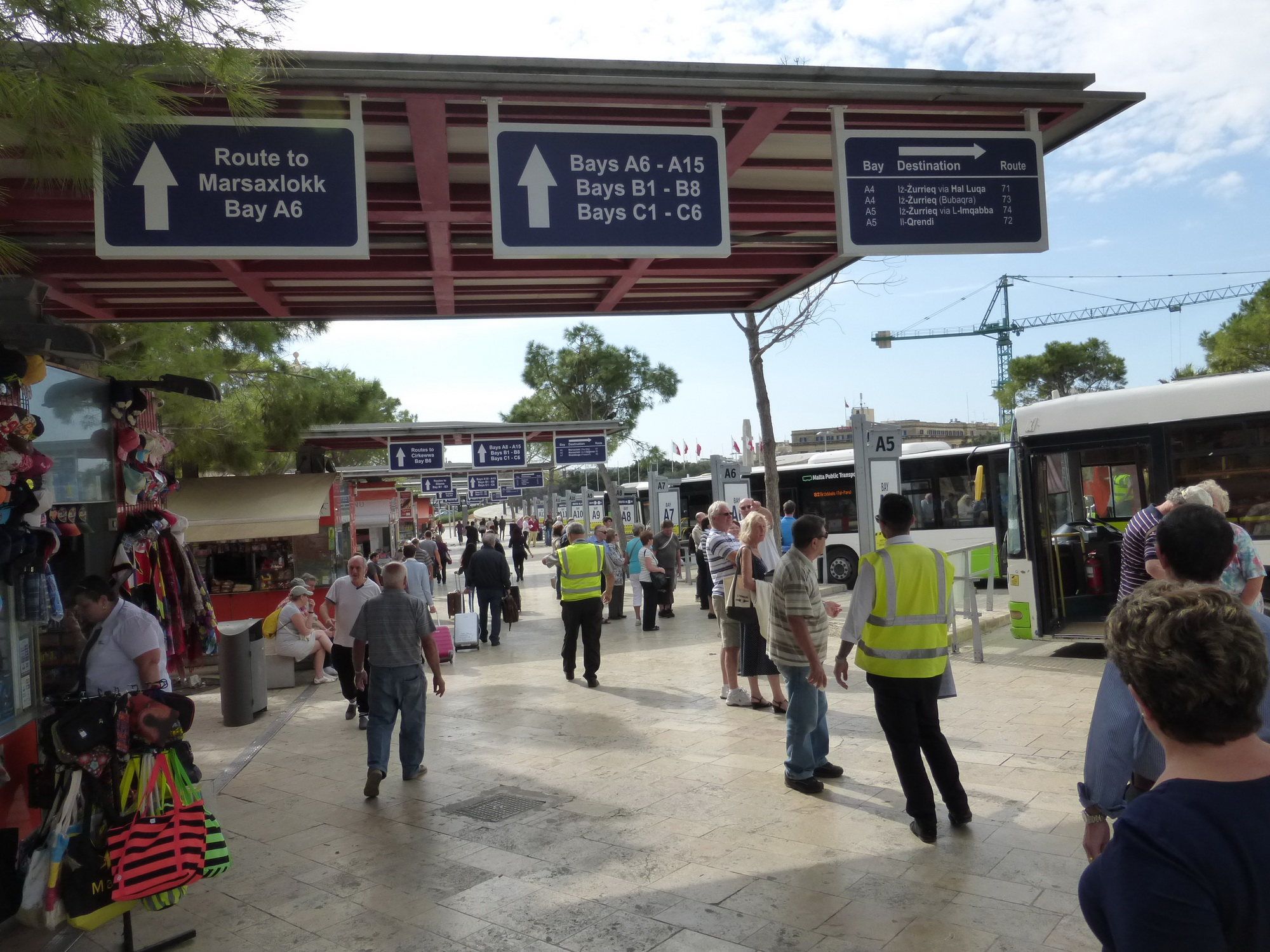 Zentraler Busbahnhof in Valletta (Malta)